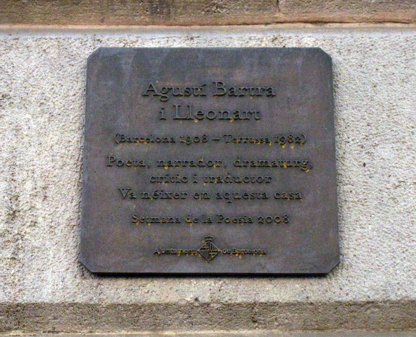 Agustí Bartra i Lleonart. La Rambla, 6 (Barcelona)